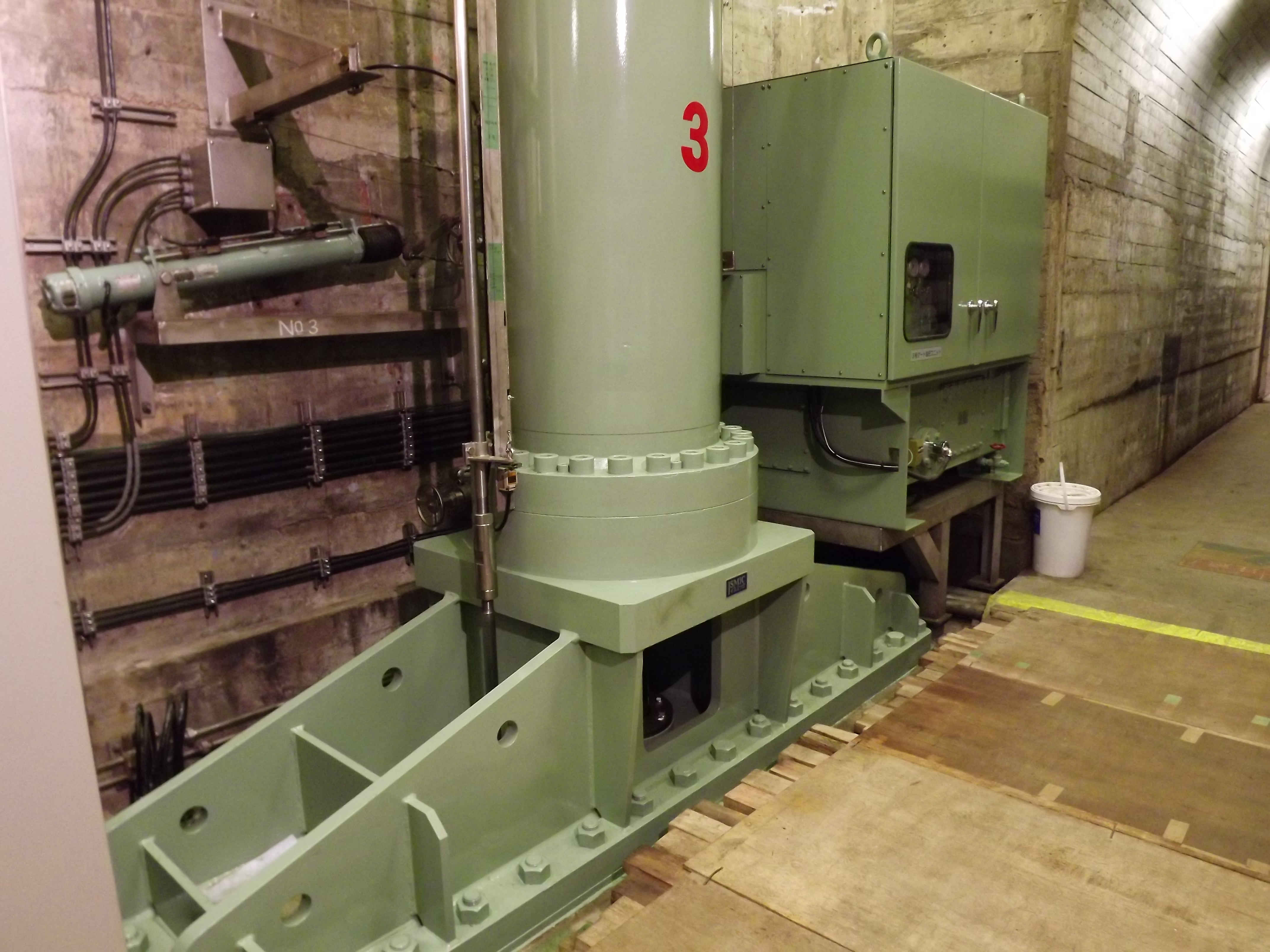 田瀬ダムコンジットゲート油圧シリンダ